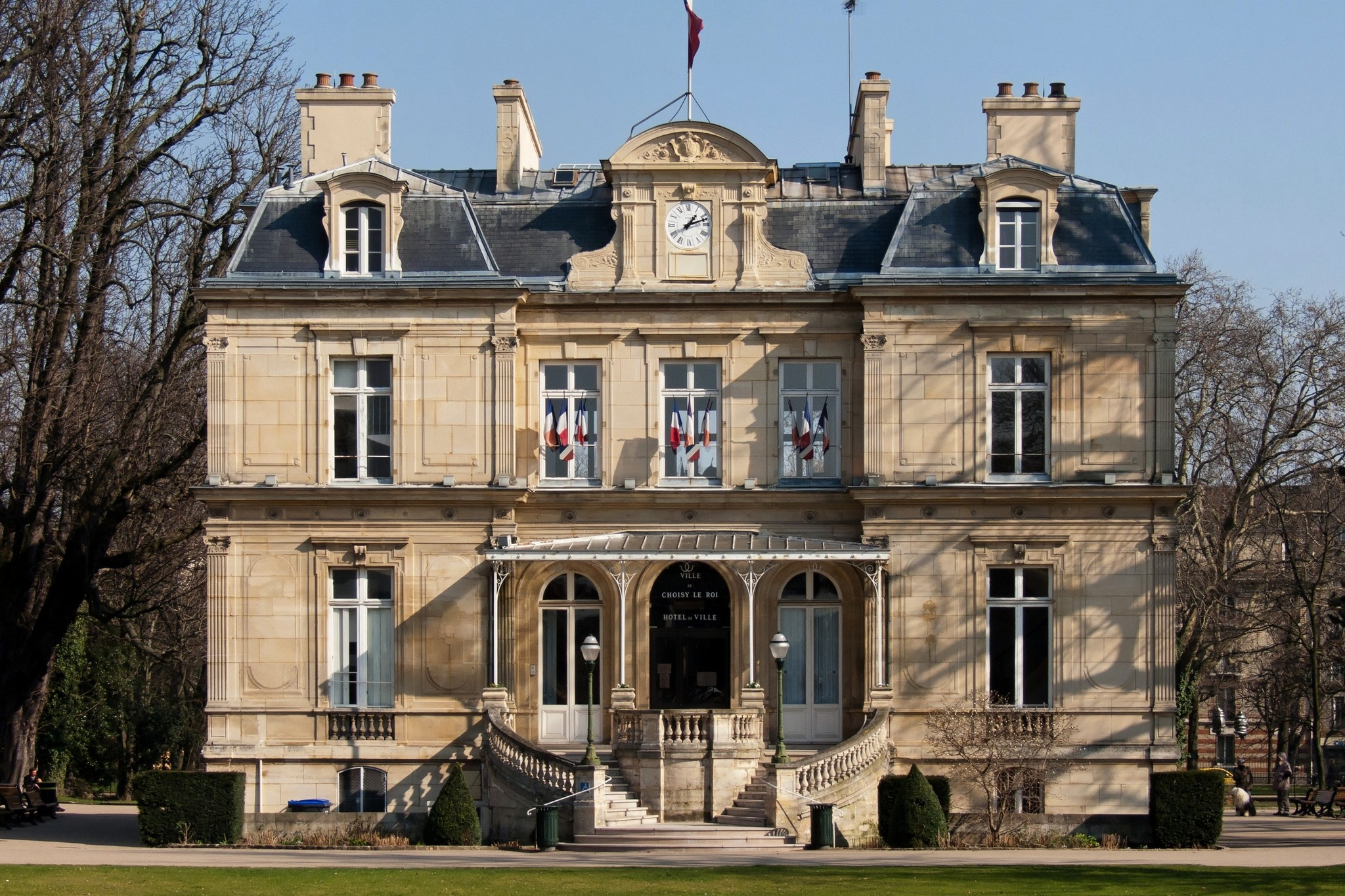 L'ancienne mairie de Choisy Le Roi (94)